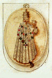 Emblema dels Cavallers de Loreto, orde militar. En un recull de blasons de 1605, dibuixat per Giacomo Fontana, a la Biblioteca estense de Ferrara.